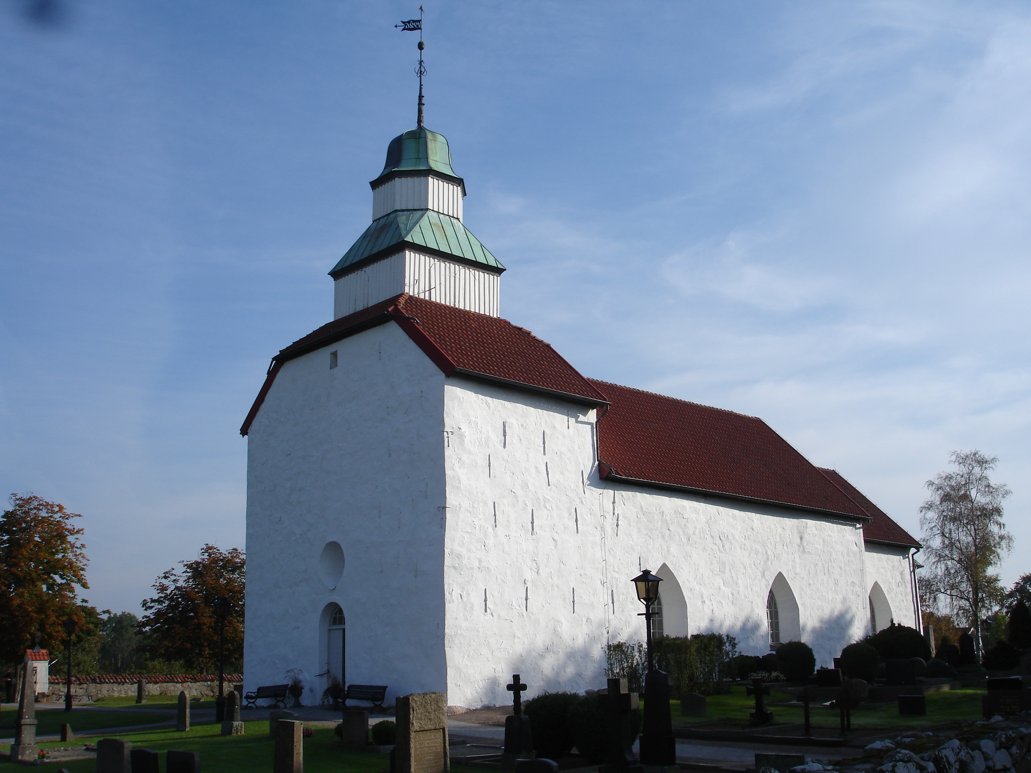 Skummeslövs kyrka i södra Halland